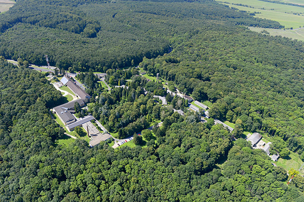 A tüdőszanatórium a levegőből, Farkasgyepű